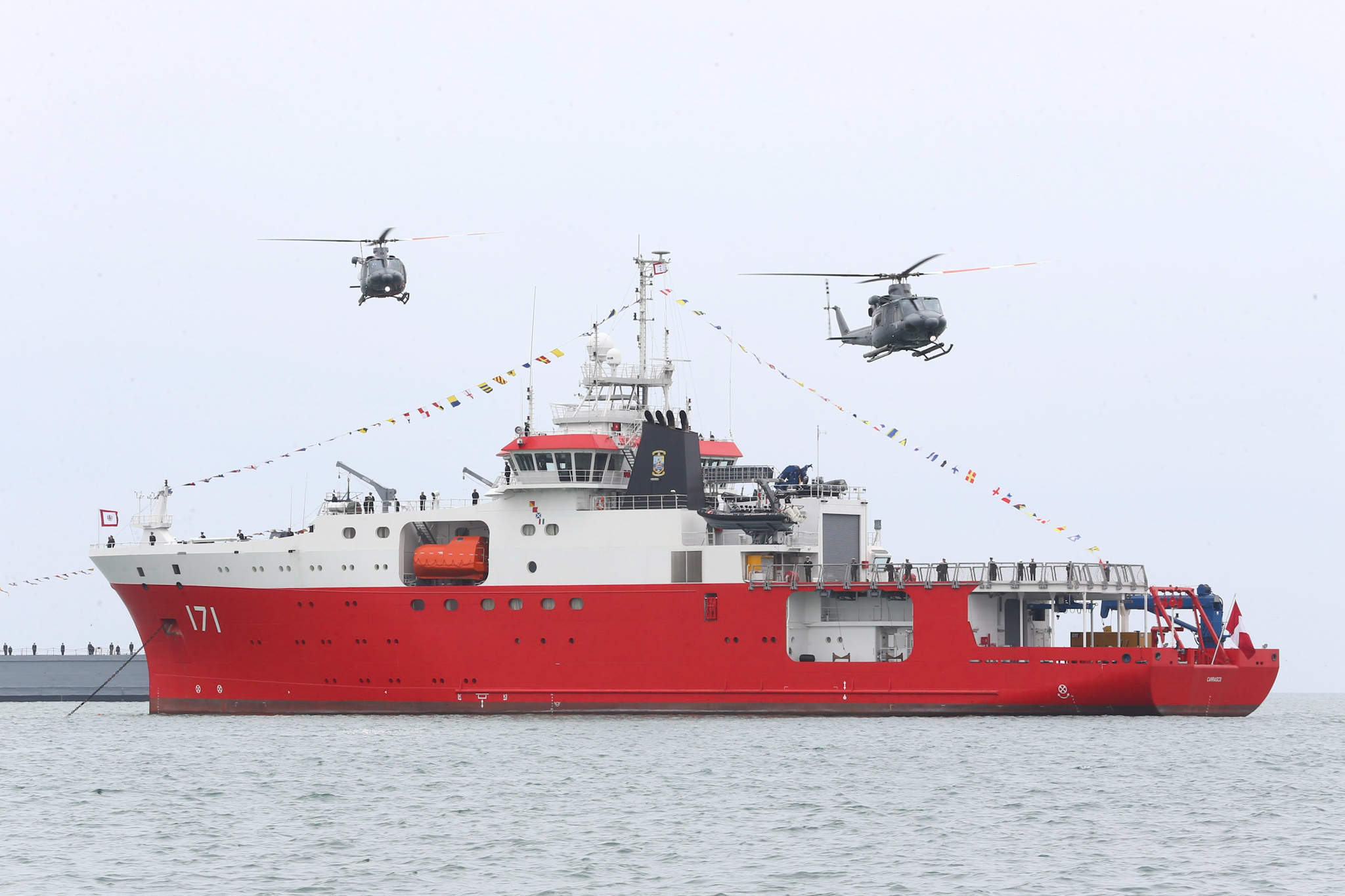 BAP Carrasco durante ceremonia por el 196 aniversario de la Marina de Guerra del Perú